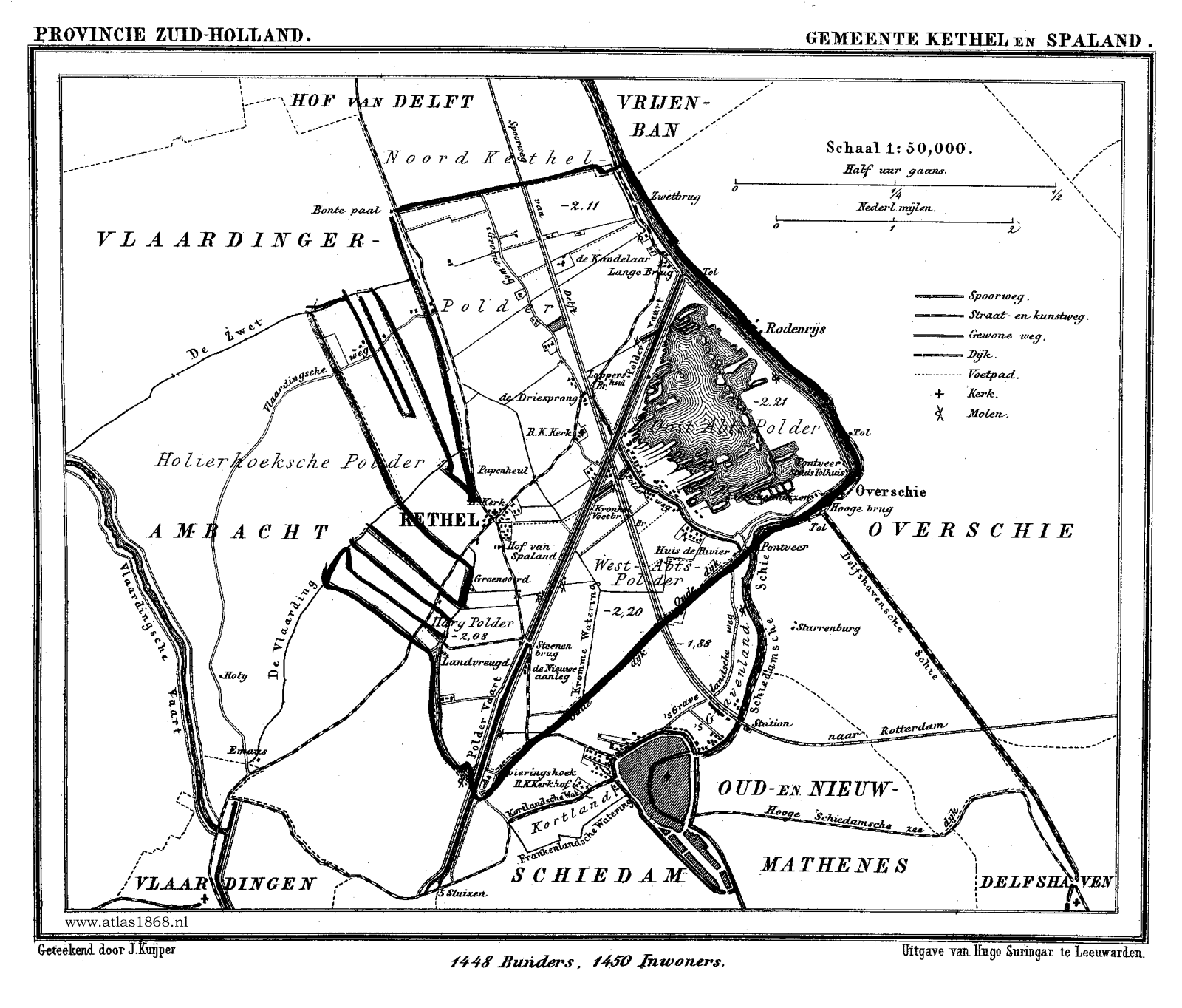 Kaart van Kethel uit Gemeente Atlas van Nederland, J. Kuyper 1865-1870, Uitgave Hugo Suringar Leeuwarden.